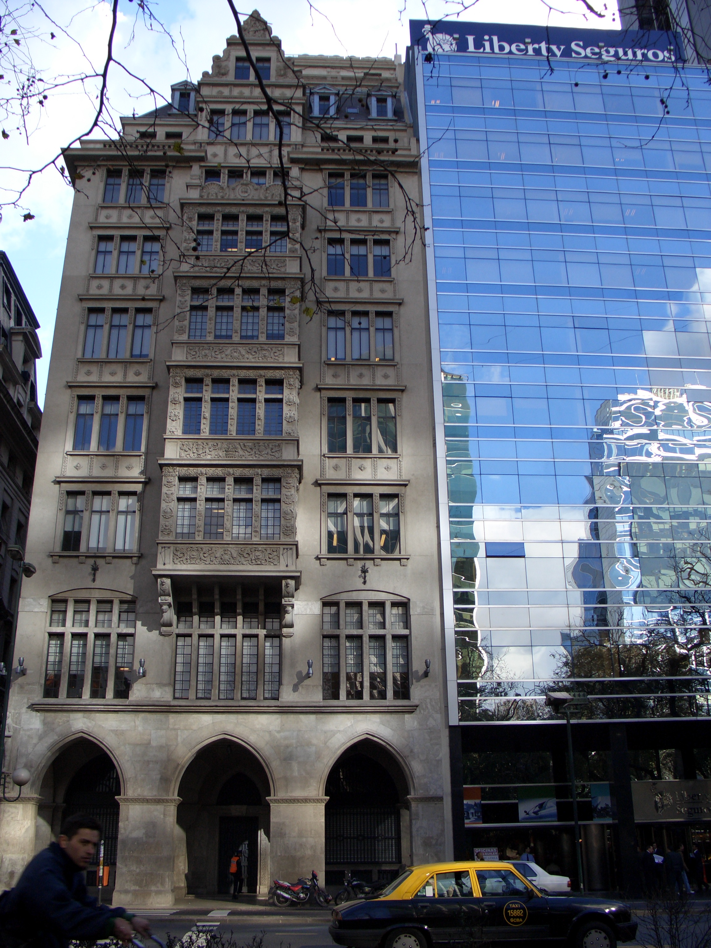 Bunge y Born Headquarters. Leandro Alem Avenue, Buenos Aires.